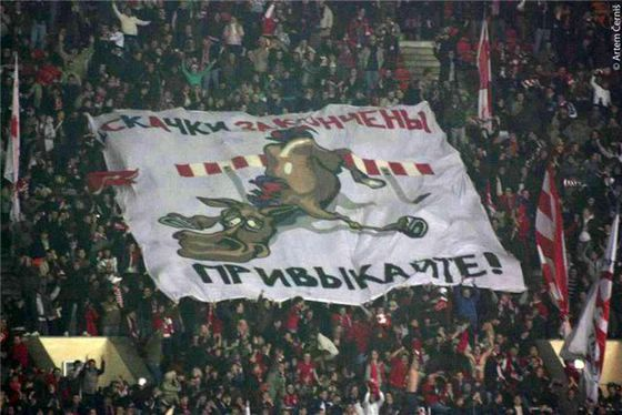 Перфоманс "Скачки закончены, привыкайте!" на матче с ЦСКА. 2008 год